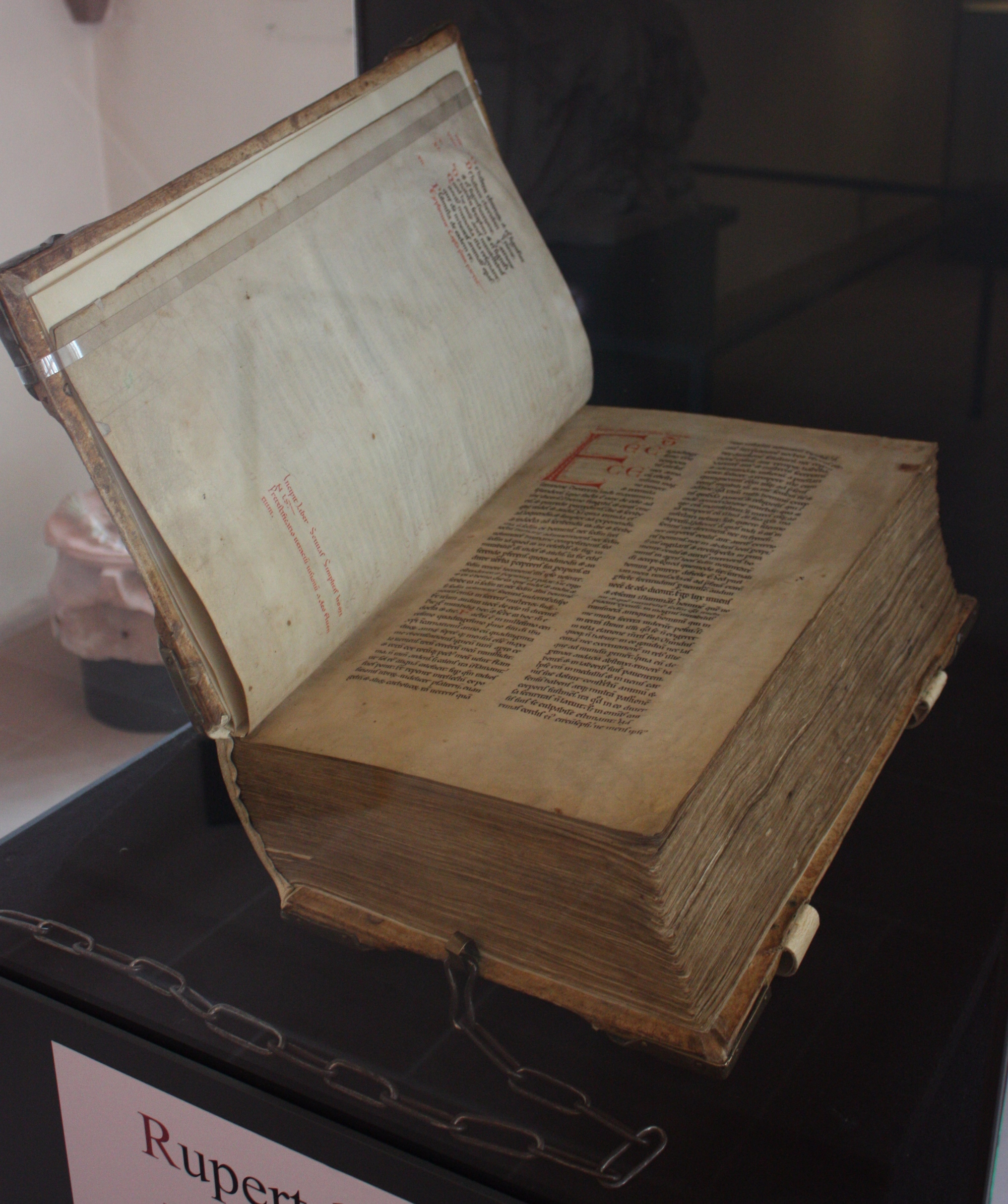 Der Rupertsberger Riesencodex bei einer Sonderausstellung 2013 im Kloster Eberbach